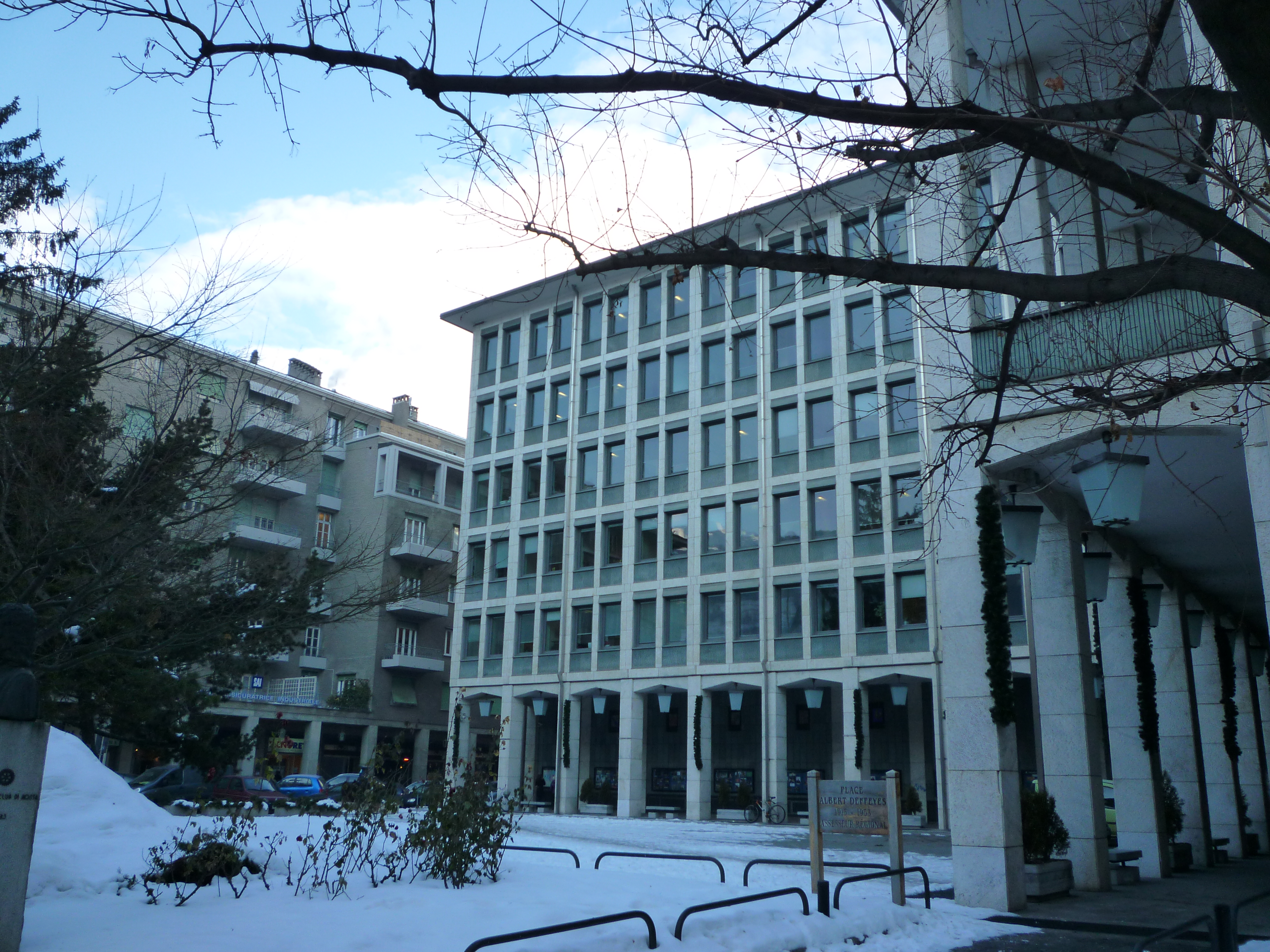 Place Albert Deffeyes à Aoste (Italie)